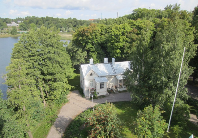 Vy från Villa Kivis utsiktstorn - Strandvillan